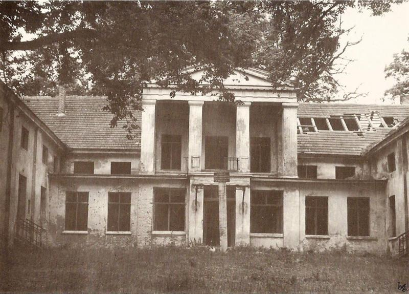 Tychowo - pałac w 1960 r.